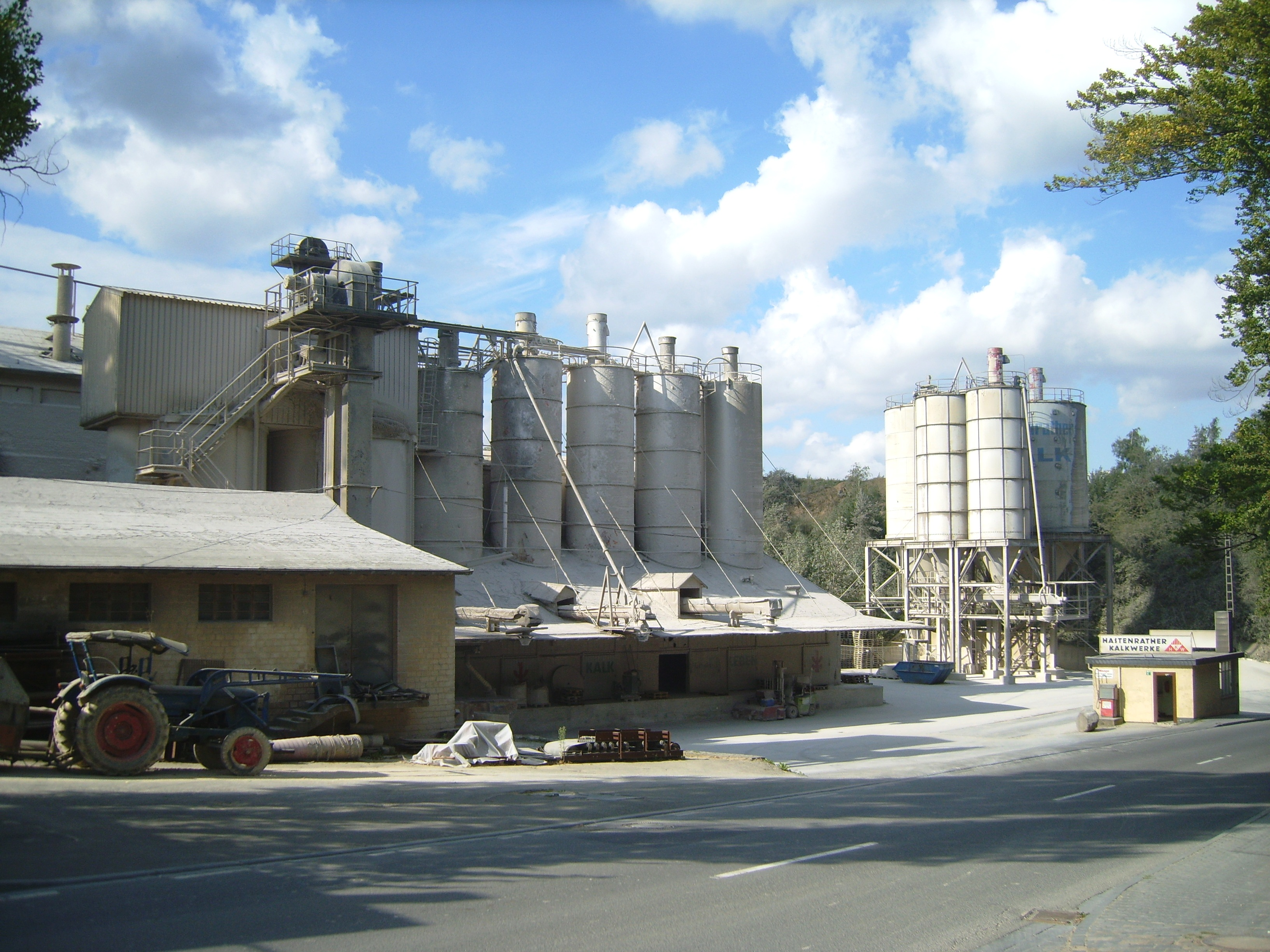 Hastenrather Kalkwerke am südlichen Ortsausgang von Hastenrath